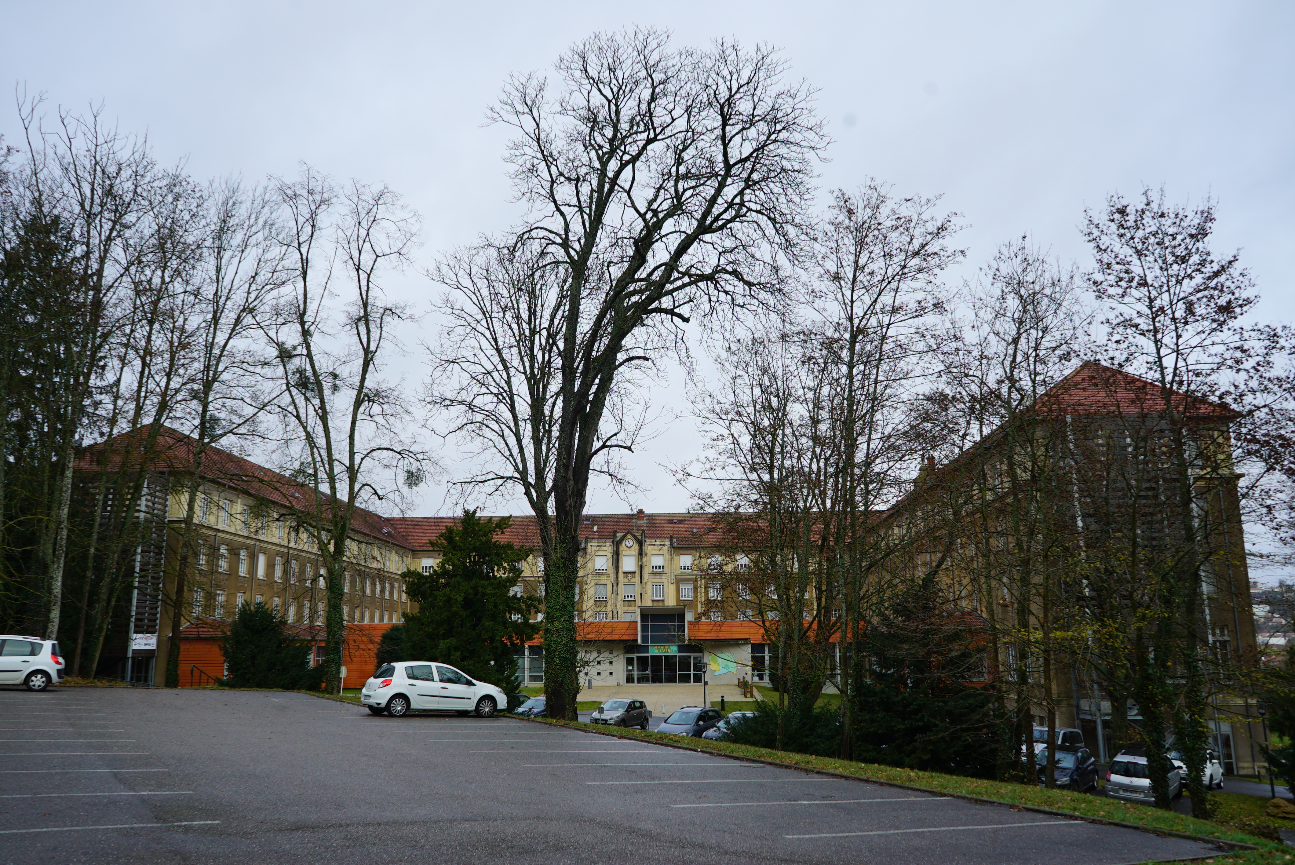 entrée principale de l'EHPAD.